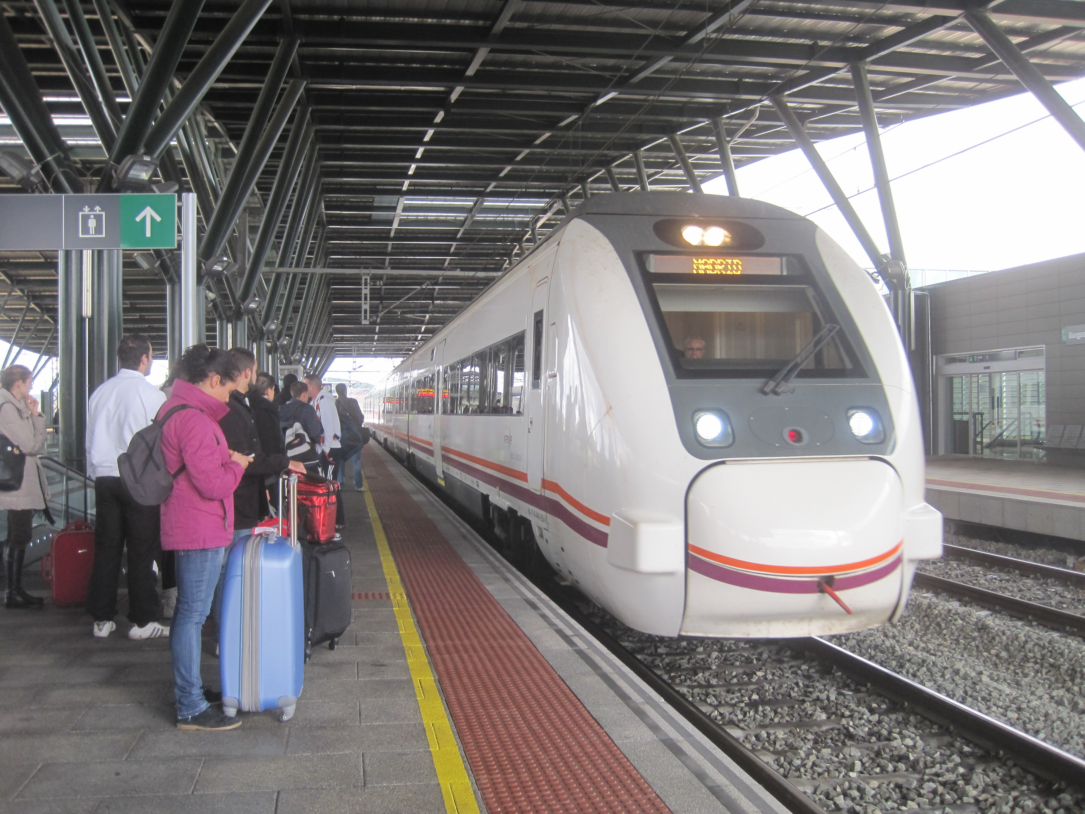 Intercity procedente de Miranda de Ebro y con destino Madrid, efectuando su parada en la estación ferroviaria de Burgos.